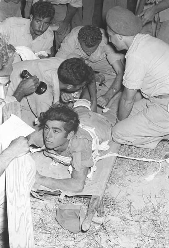 פעולות-תגמול, פשיטת לילה בחאן-יונס, מבצע "אלקיים". פעולות-תגמול, פשיטת לילה בחאן-יונס, מבצע "אלקיים", ,ד"ר שלמה שבלת וחייליו מטפלים בחייל פצוע. מקום הצילום : חאן-יונס.